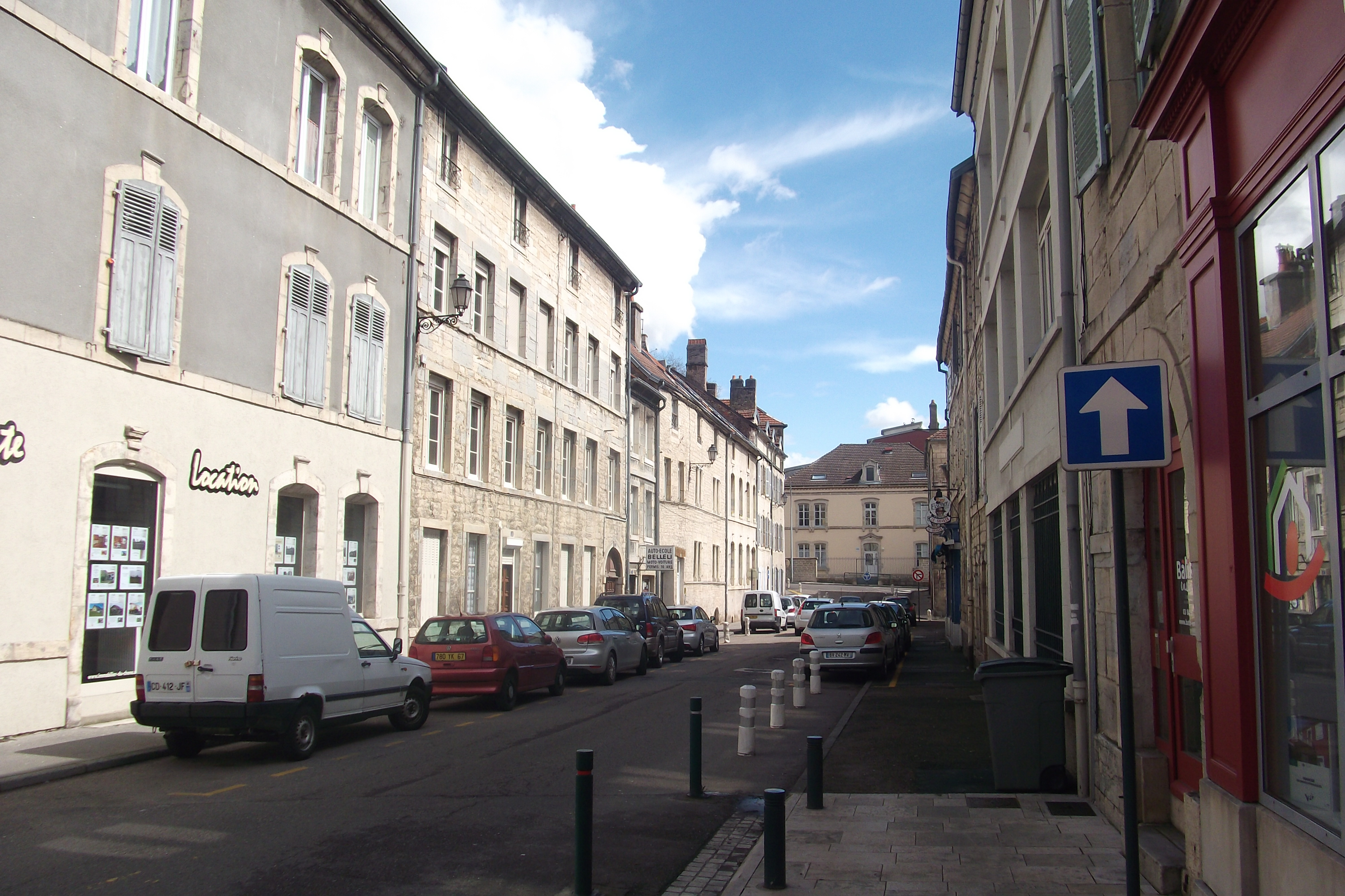 La rue du Palais dans le centre-ville de Vesoul (Haute-Saône, Franche-Comté)